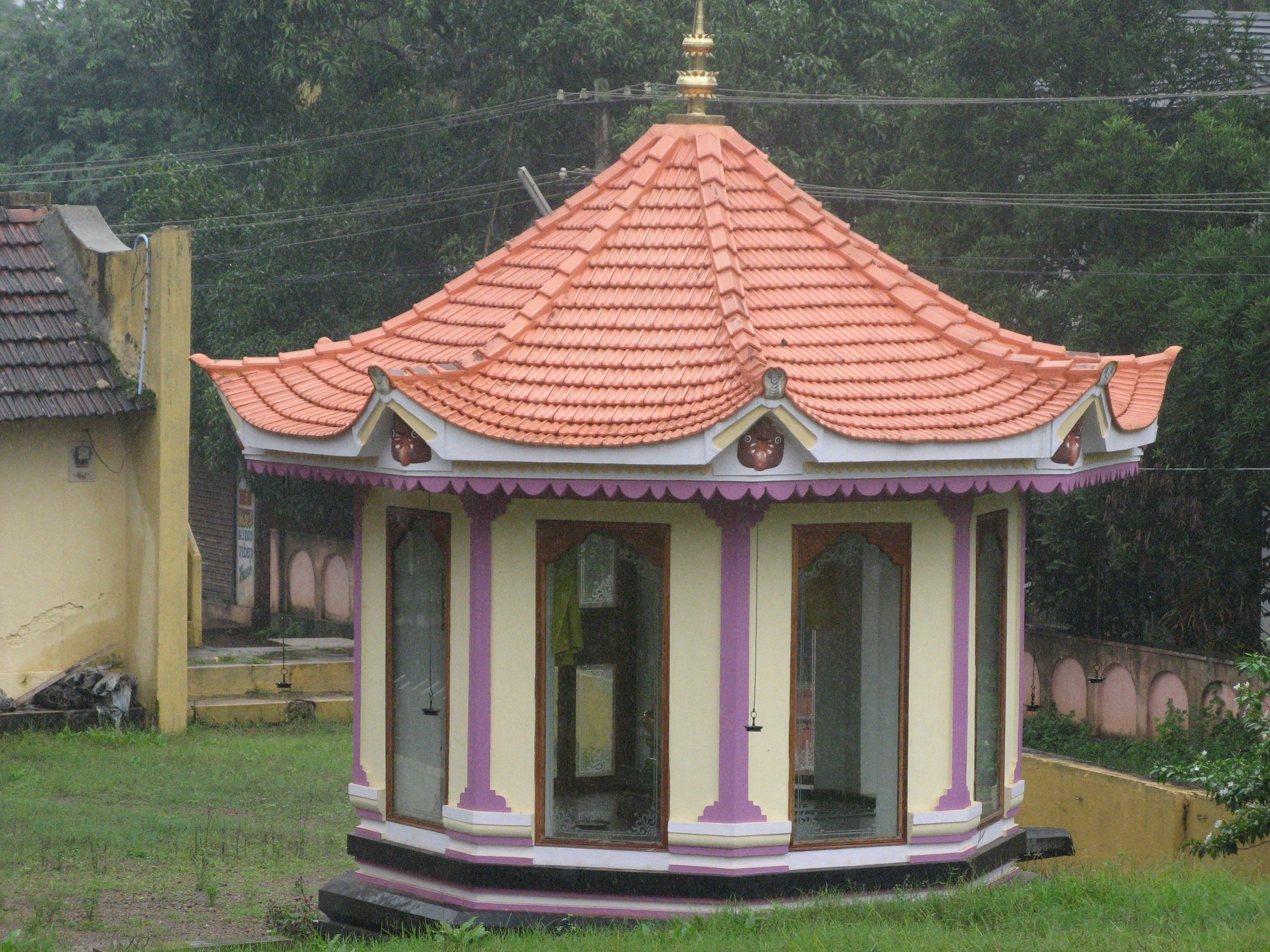 Eravathur പുറപ്പിള്ളിക്കാവ് ഭഗവതി ക്ഷേത്രം - പുതുതായി പണിത ഗുരുസ്തൂപം